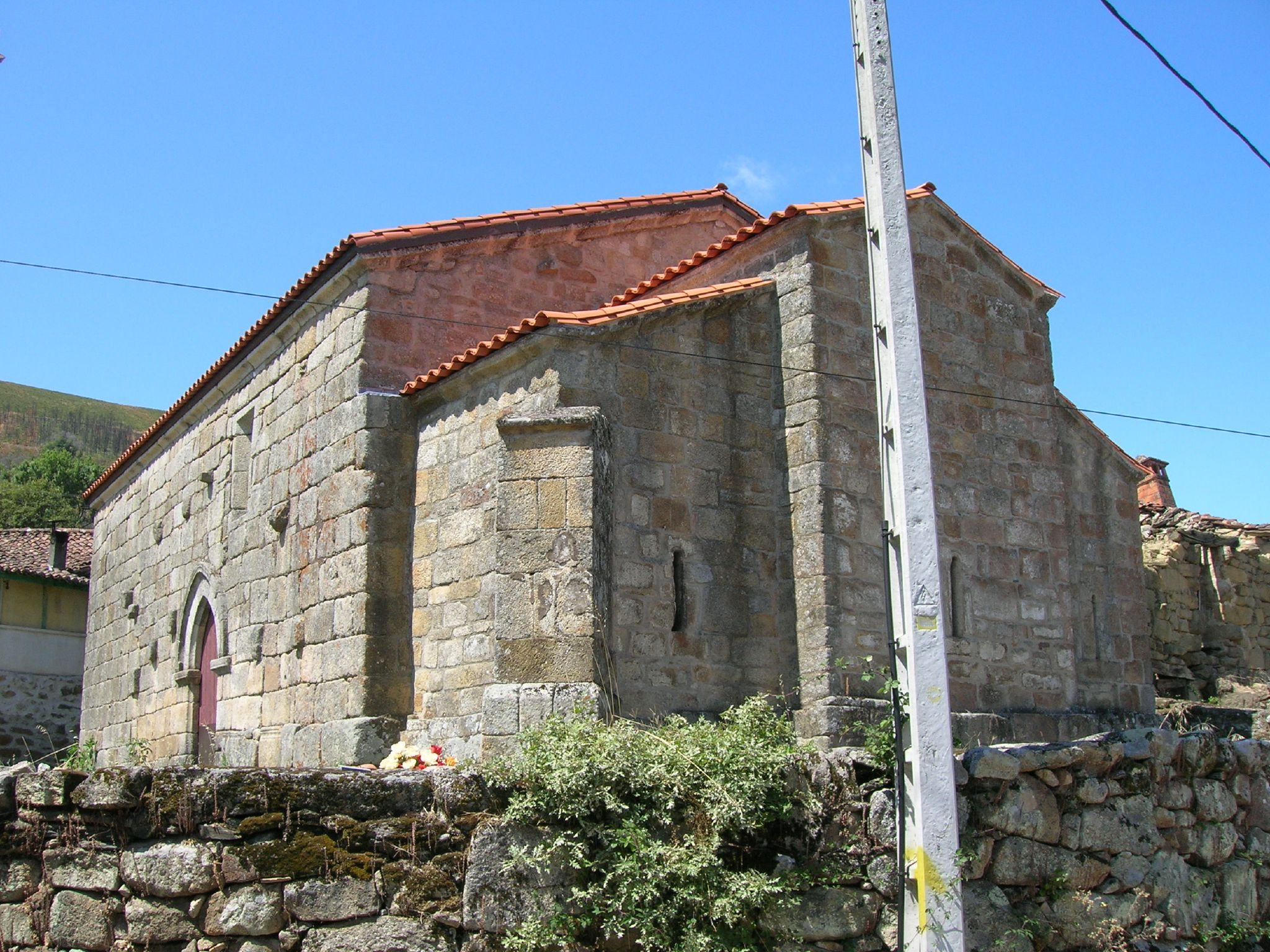 Cabecera prerrománica con tres ábsides y tres ventanas. La nave fue reconstruida en los siglos XV y XVI.